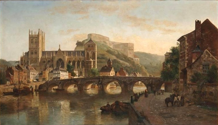 Le tableau montre le pont sur la Meuse (Li Pontia), la collégiale et la citadelle